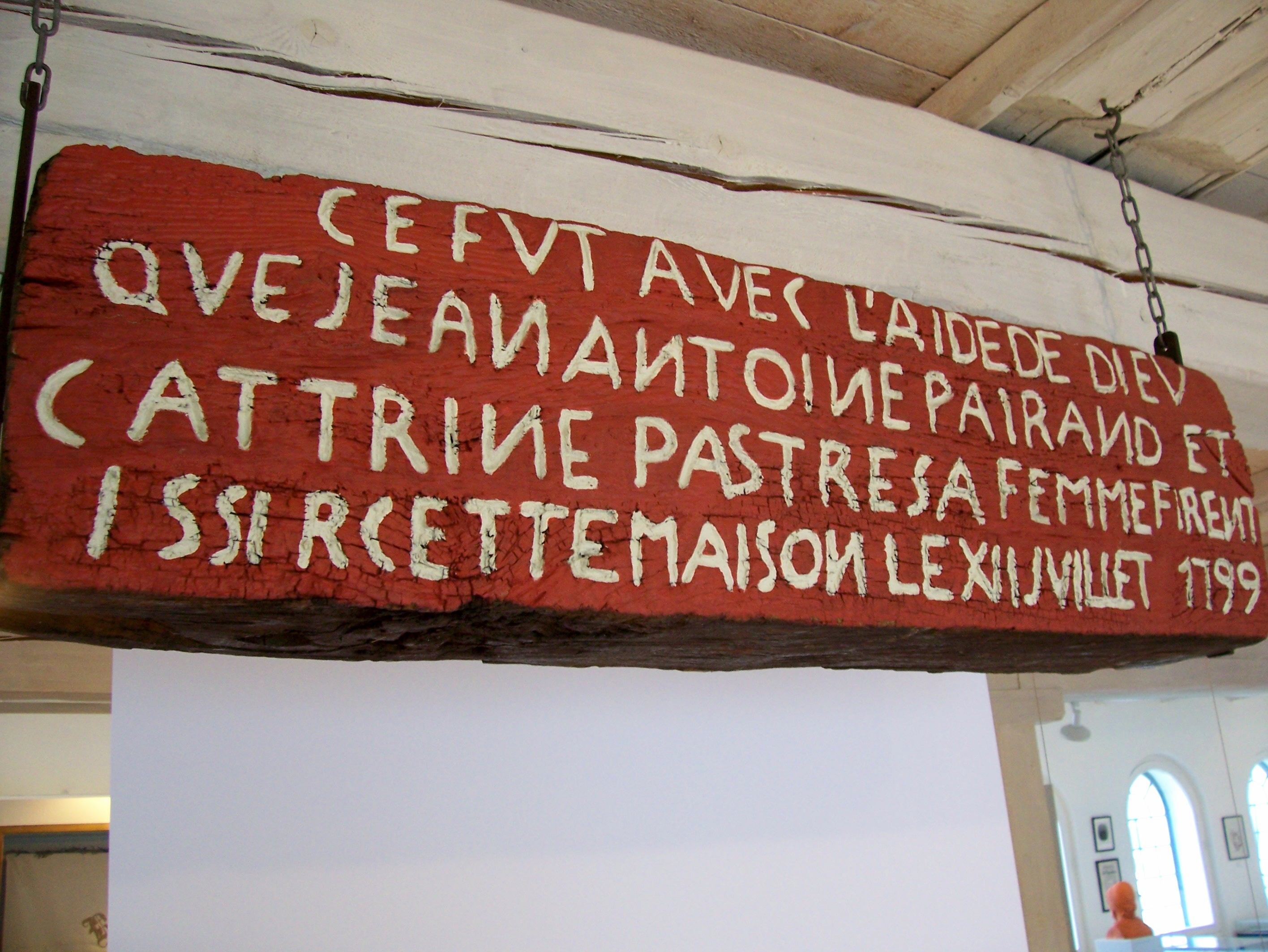 Französischsprachige Tafel der Hugenotten aus Bad Karlshafen (Deutschland).